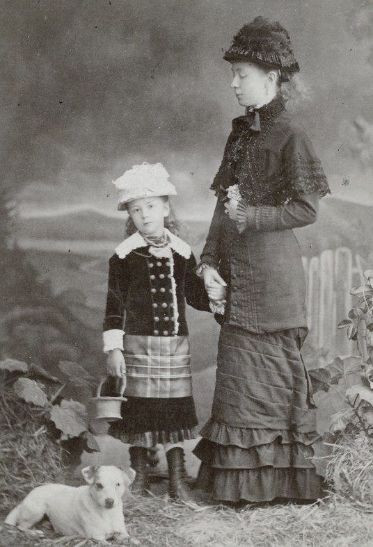 Княгиня Ольга Дмитриевна Барятинская, ур. Святополк-Мирская (1855—1898) с дочерью Олимпиадой.